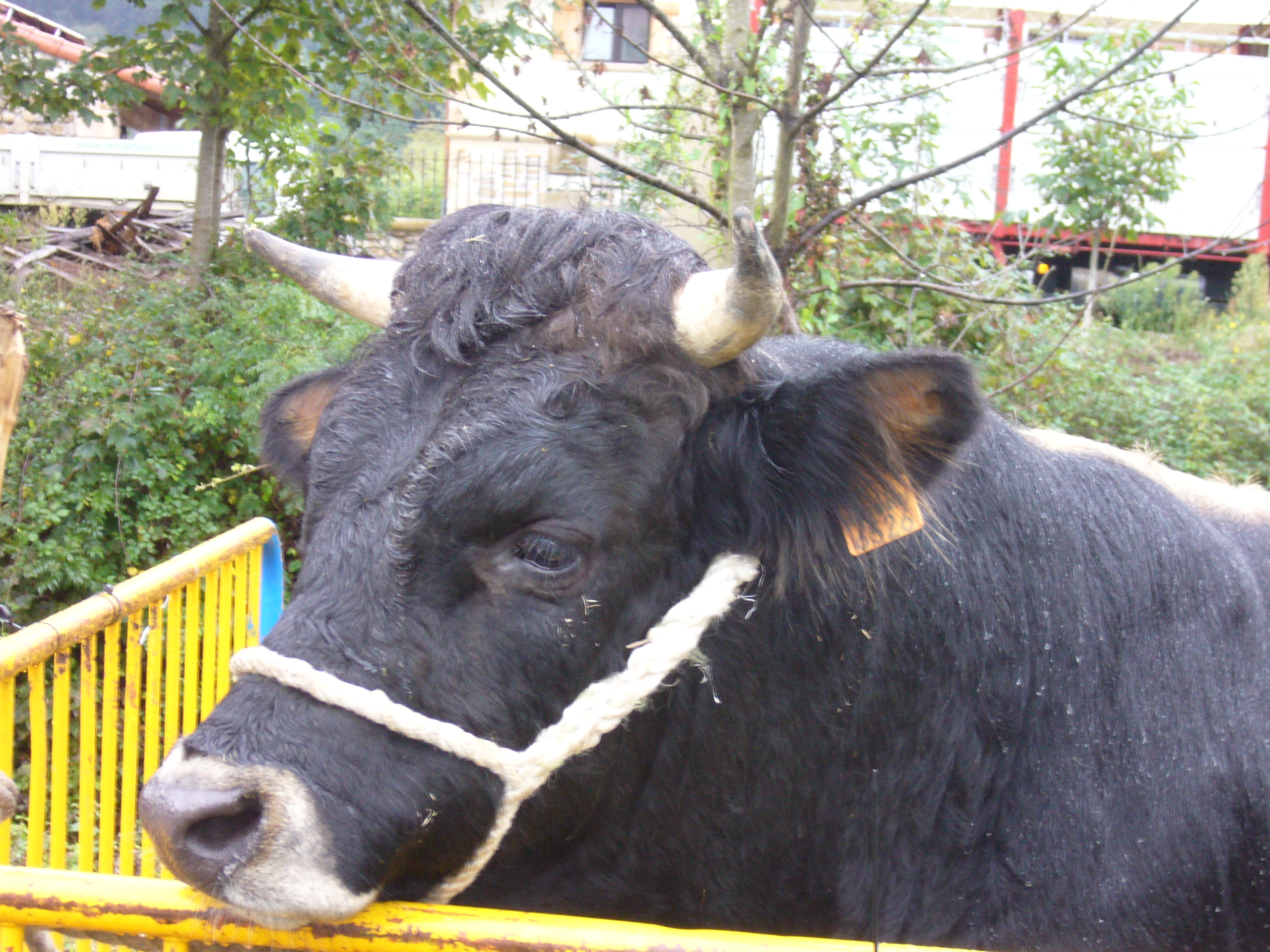 Terreñaren zezen burua